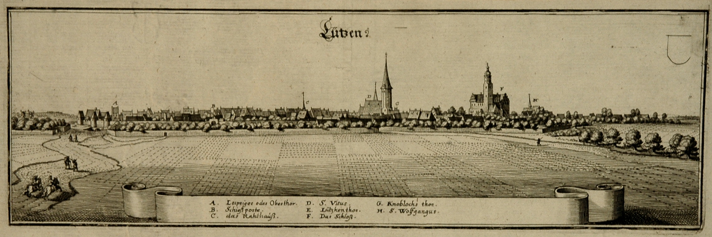 Lützen| um 1650; Kupferstich von Merian, 1650 10 x 32cm